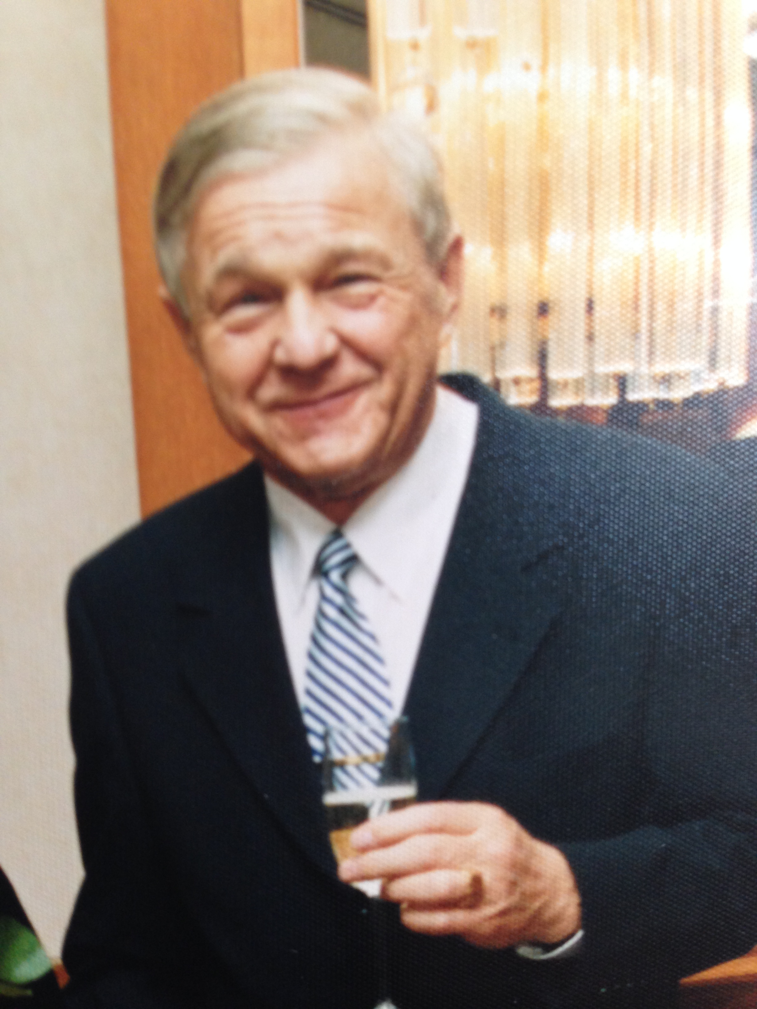 Porträtfotografie von Prof. Dr. Gottfried Dominok (1932–2010)